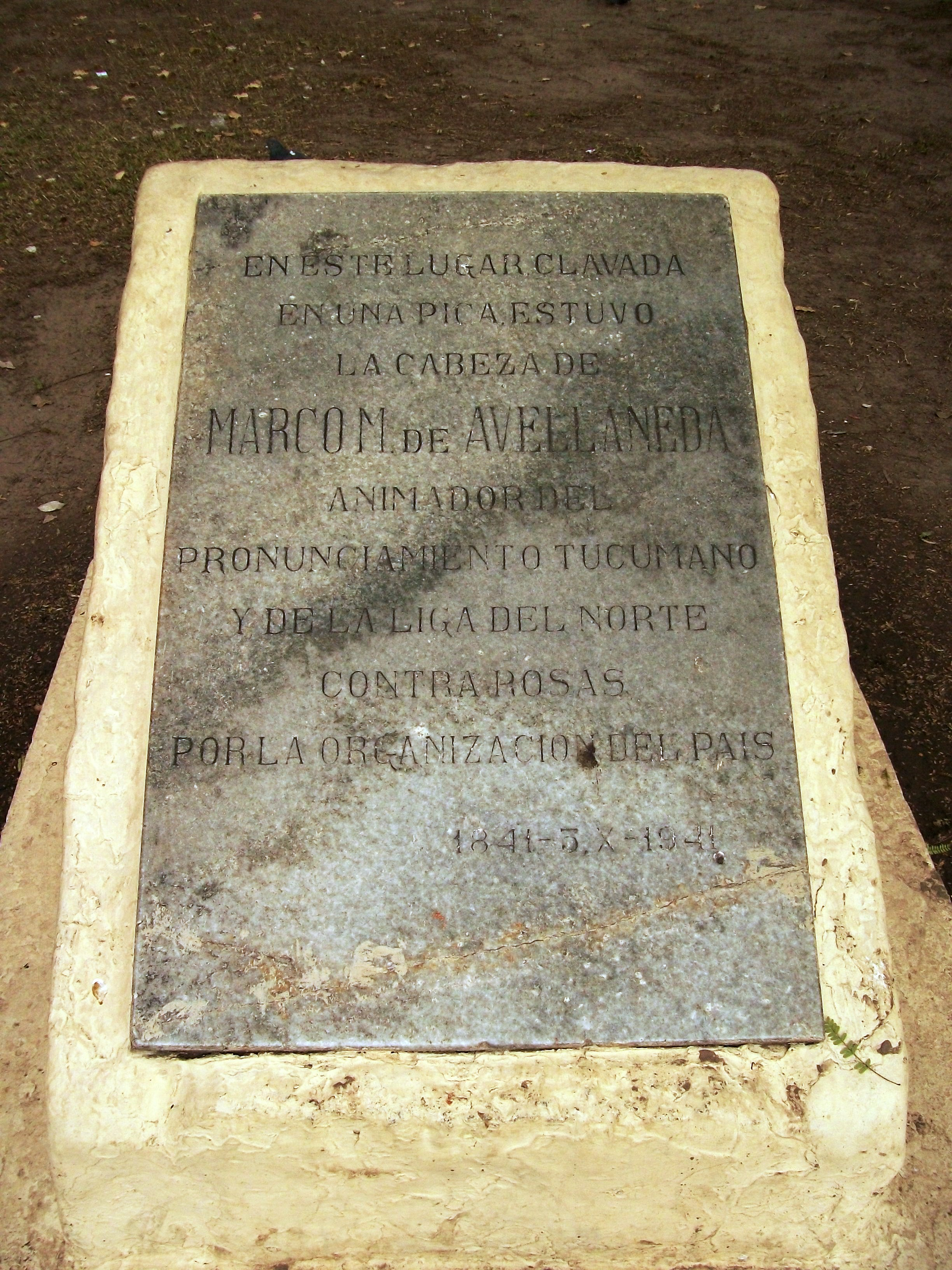 Placa en la Plaza Independencia de la ciudad de Tucumán, donde fuera clavada y exhibida la cabeza de Marco Avellaneda.